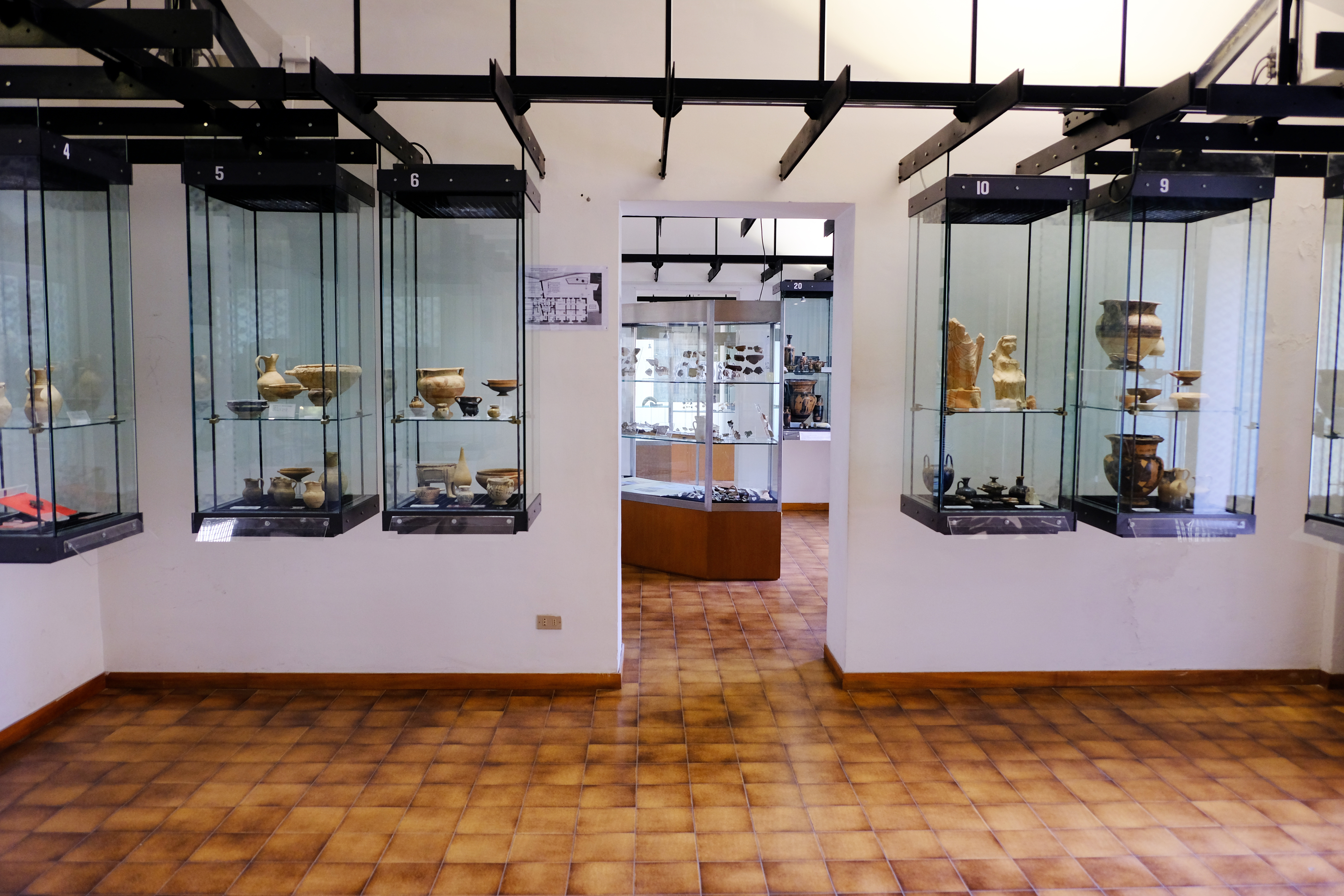 Una sala del museo